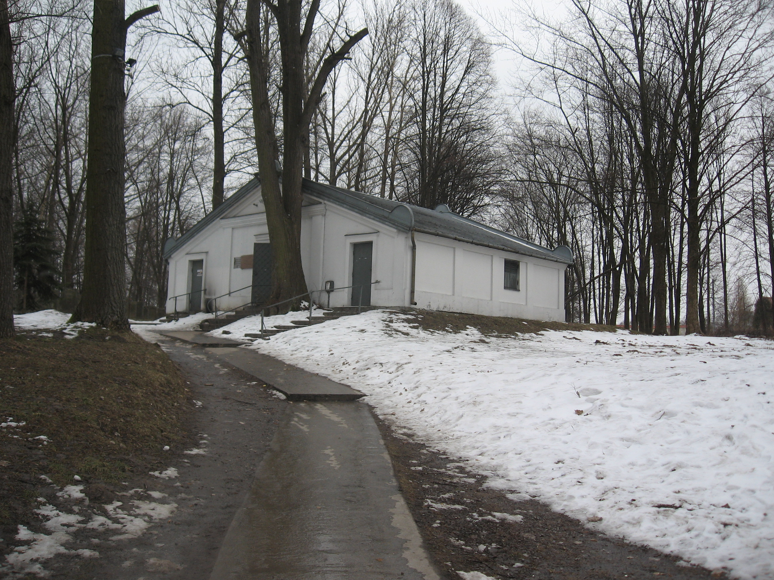 האוהל שנבנה על קברו של רבי אלימלך בליז'נסק